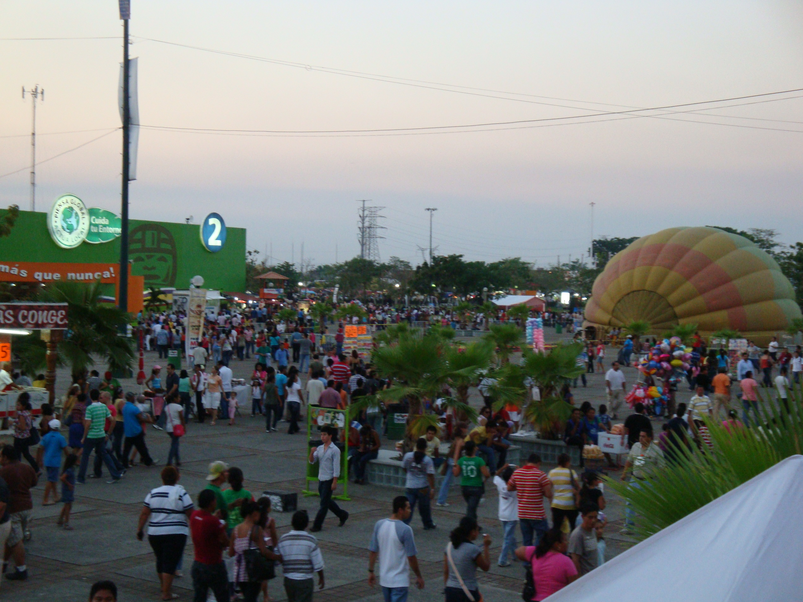 Explanada principal del Parque Tabasco, sede de la Feria Tabasco.